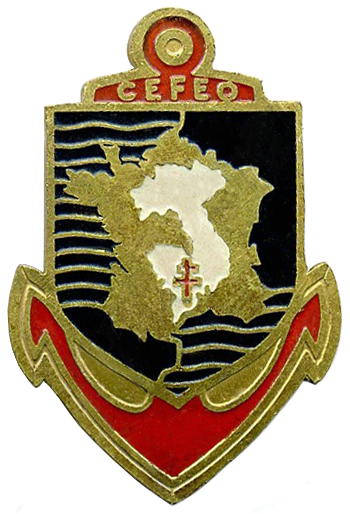 Insigne du corps expéditionnaire en extrême orient